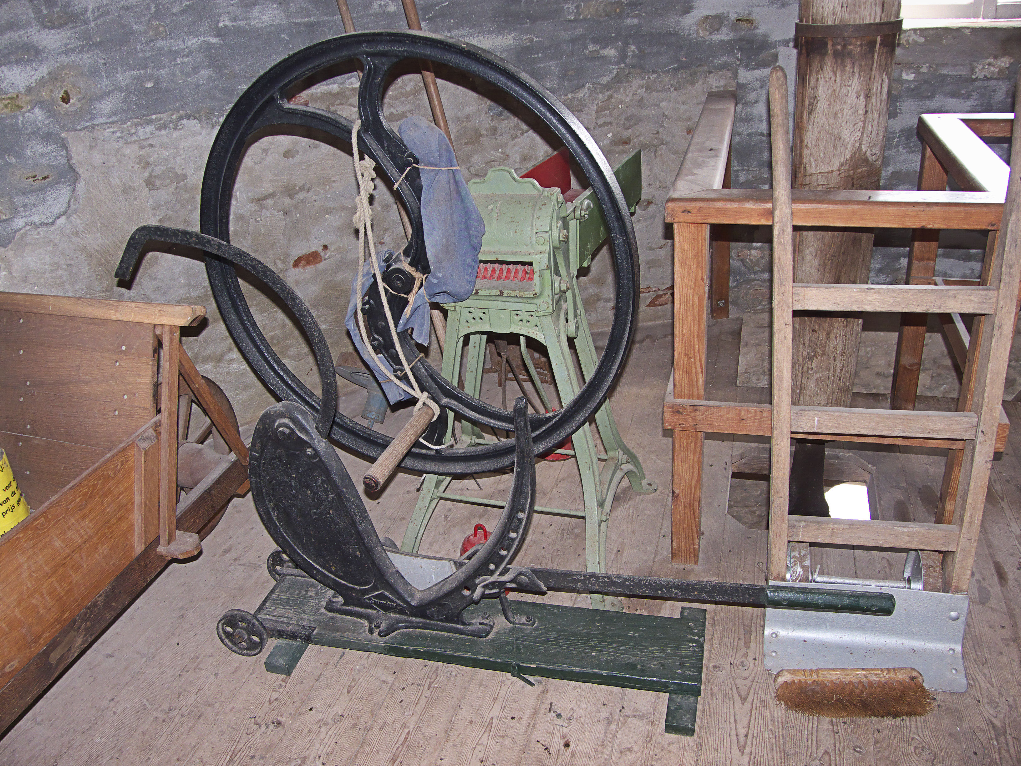 Wenninkmolen, koekenbreker op de achtergrond, stro- of rietsnijder op de voorgrond